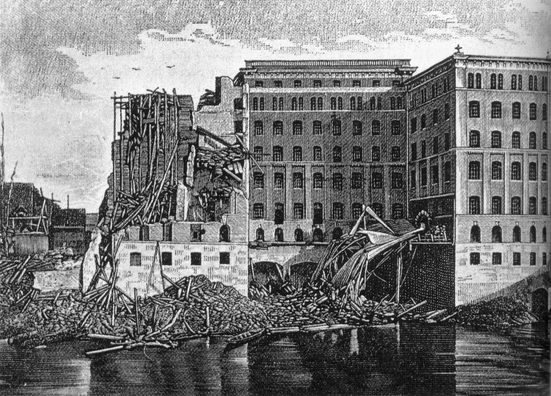 Original caption: “ Neue Wesermühle in Hameln nach einer Getreidestaubexplosion im Jahre 1887 ”